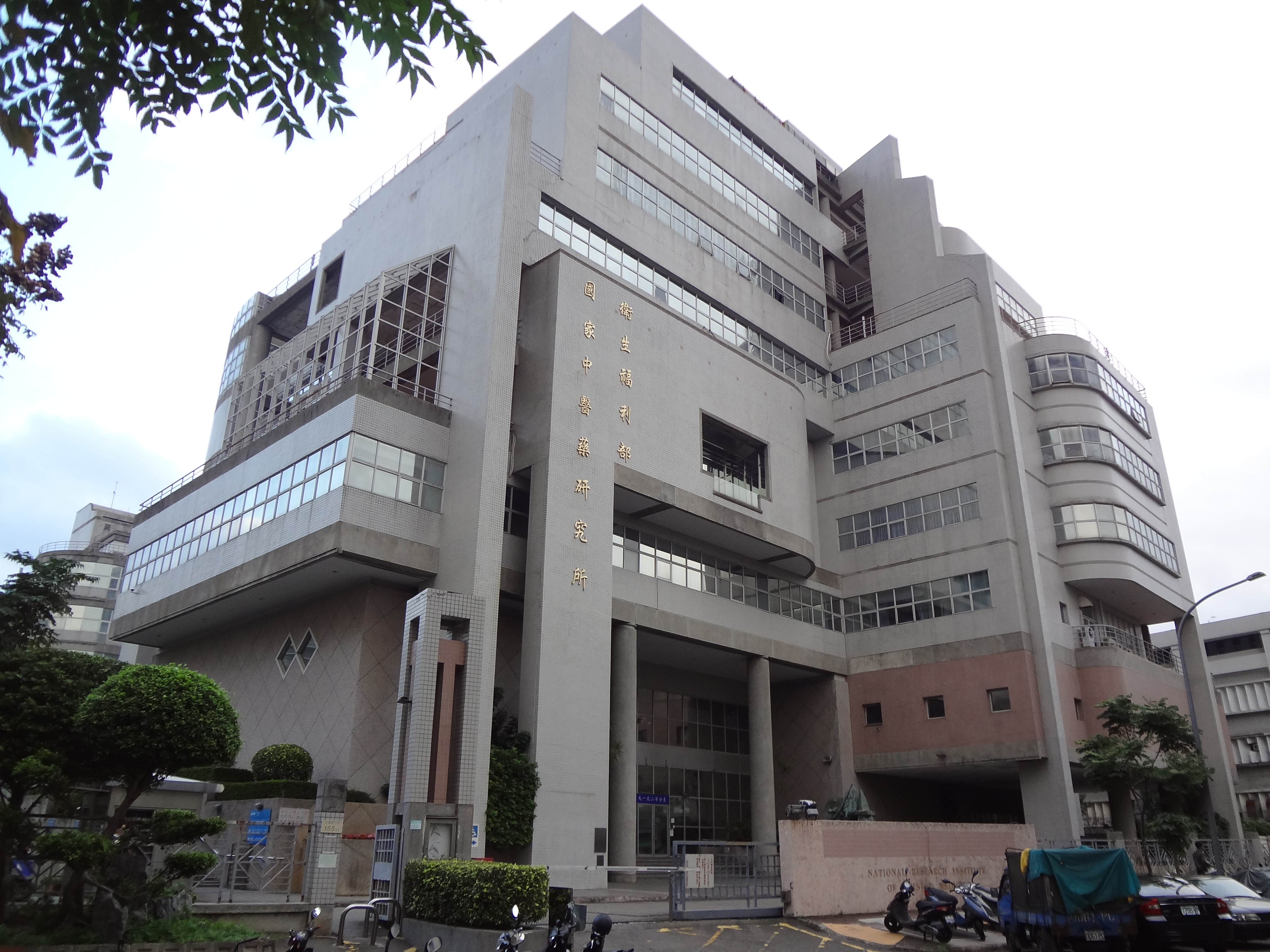 中華民國衛生福利部國家中醫藥研究所，位於臺北市北投區立農街二段155之1號。